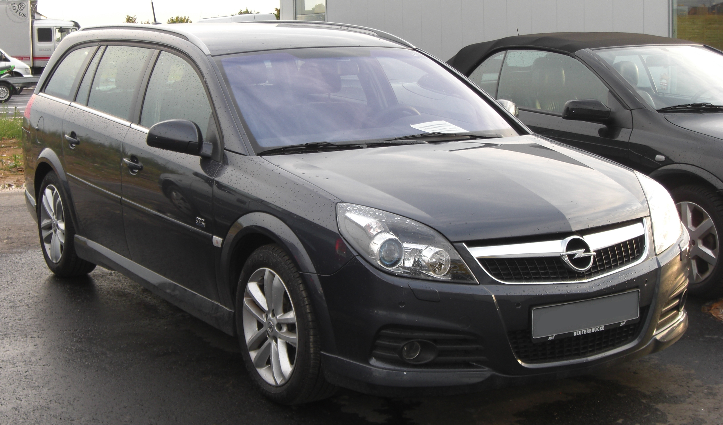 Opel Vectra C Caravan Facelift